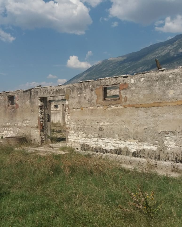 pamje nga kampi